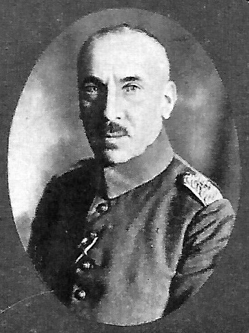 Major Severin, nur zur Verleihung des Pour le Mérite-Ordens Vorgeschlagen